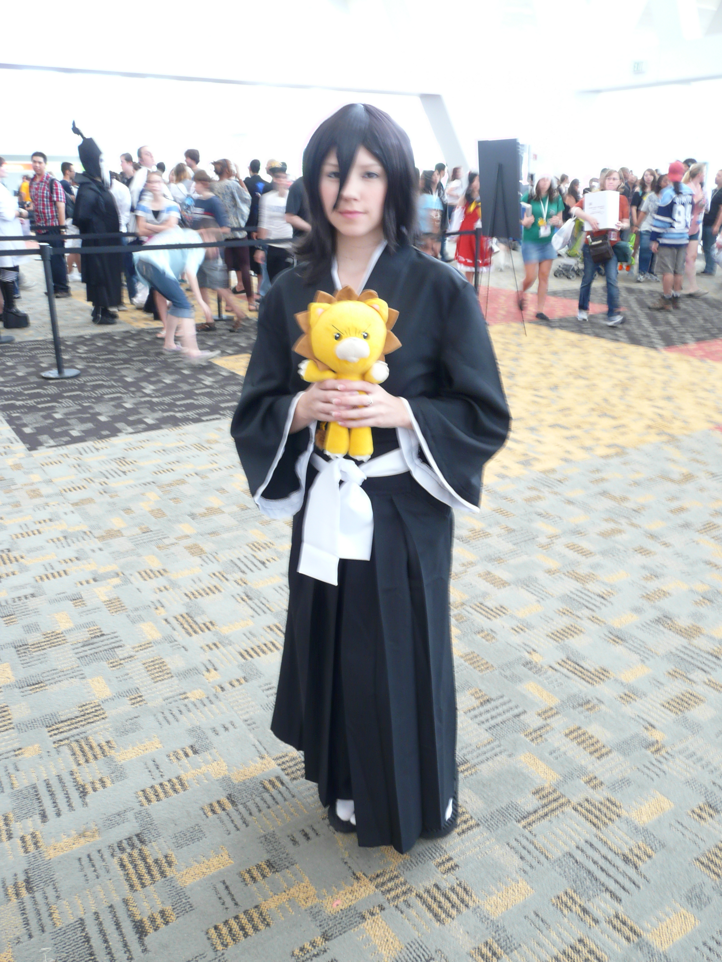 Otakon 2012 cosplay